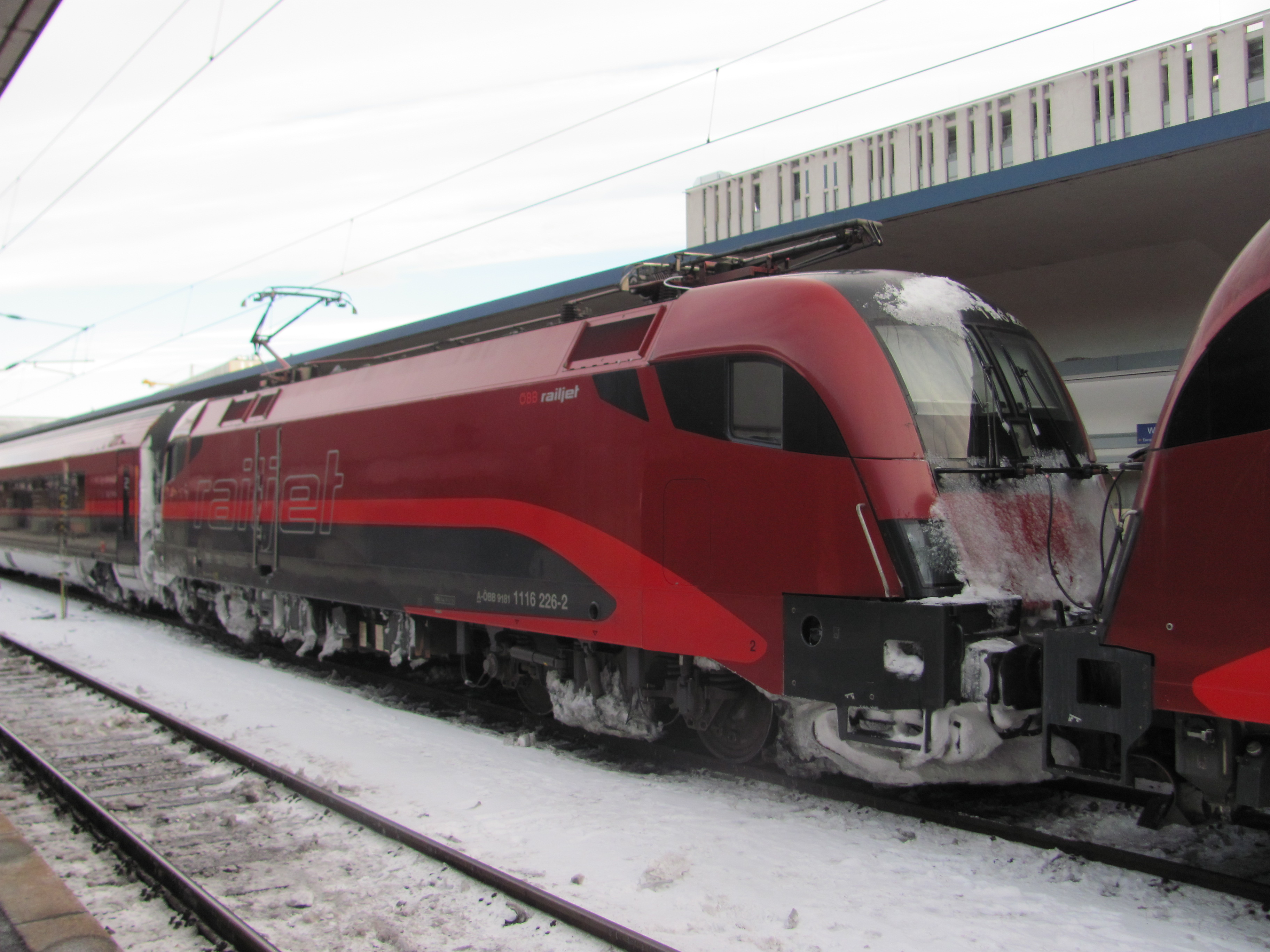 Zweiteiliger ÖBB-Railjet mit Lok ÖBB 1116 226 im Wiener Westbahnhof